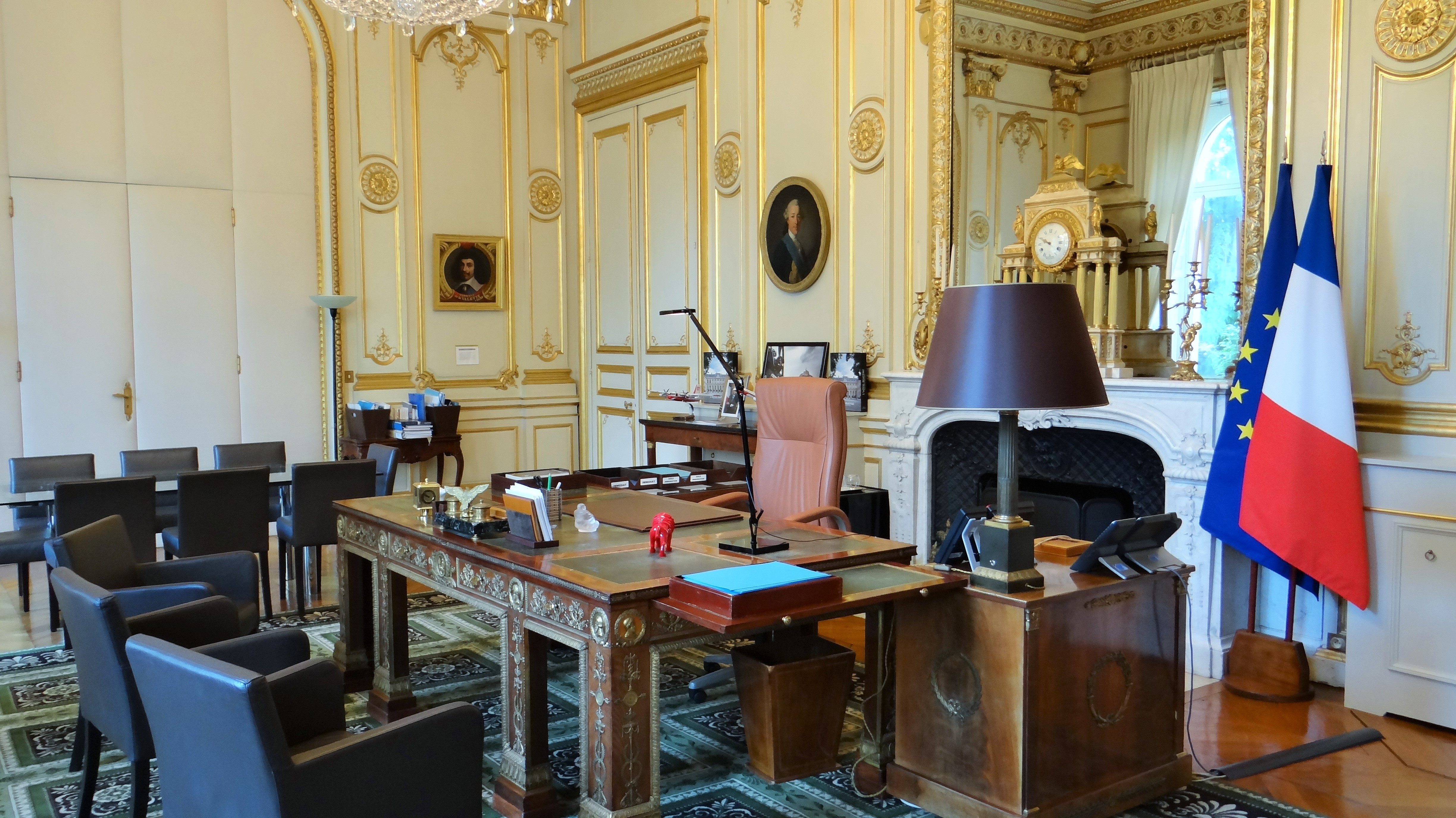 Hôtel Beauvau, bureau du ministre .